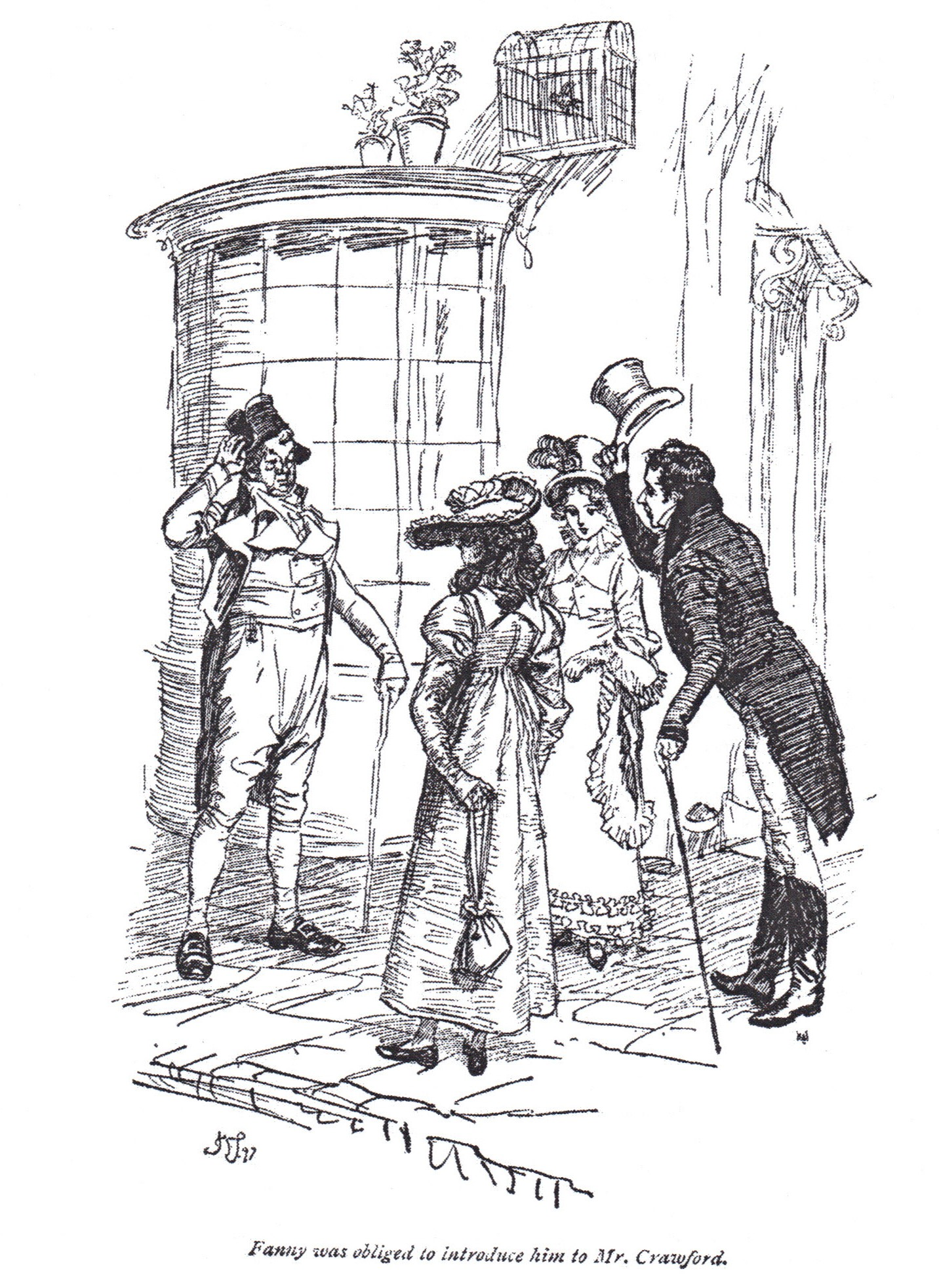 Mansfield Park (Jane Austen), ch 41 : A Portsmouth, Fanny est obligée de présenter Mr Crawford à son père